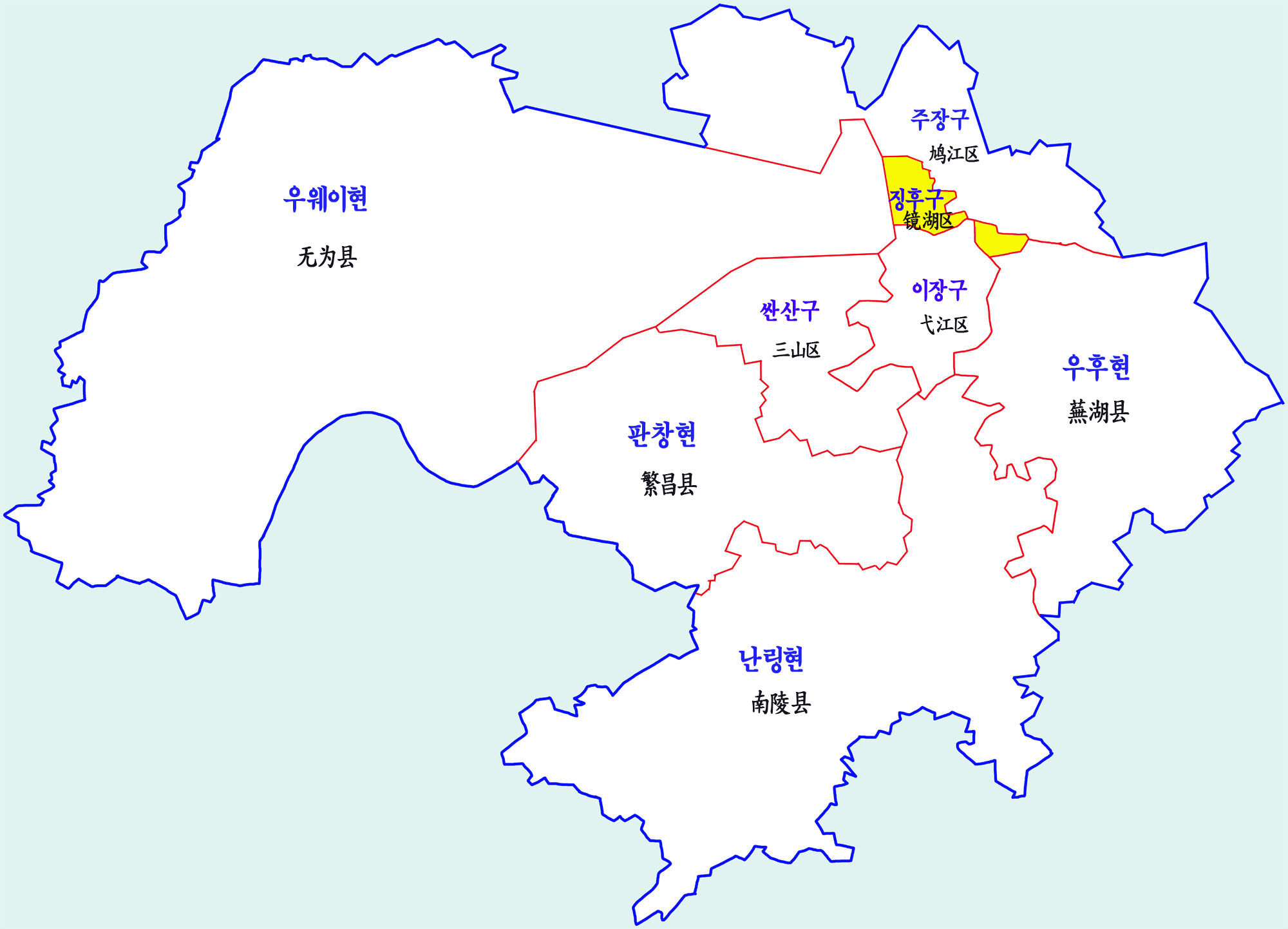 우후시 현급행정구역